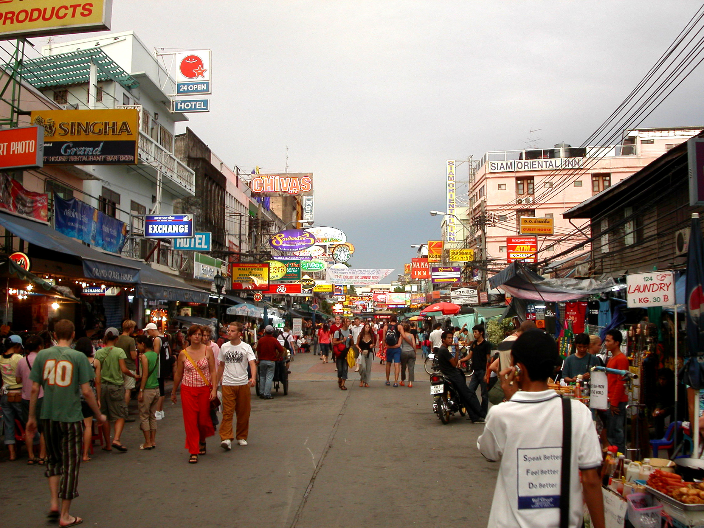 Khaosan road en 2005 Montre la densité de la foule qui est à ce moment loin d'être à son apogée. tnlavie